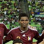 Selección de fútbol de Venezuela previo a un partido amistoso ante Guinea. Arriba de izquierda a derecha: Giacomo Di Giorgi, Andrés Túñez, José Luis Granados, José Manuel Rey, Leo Morales. Abajo de izquierda a derecha: Yohandry Orozco, Franklin Lucena, Alexander González, Giancarlo Maldonado, Alejandro Moreno y Ángel Chourio.